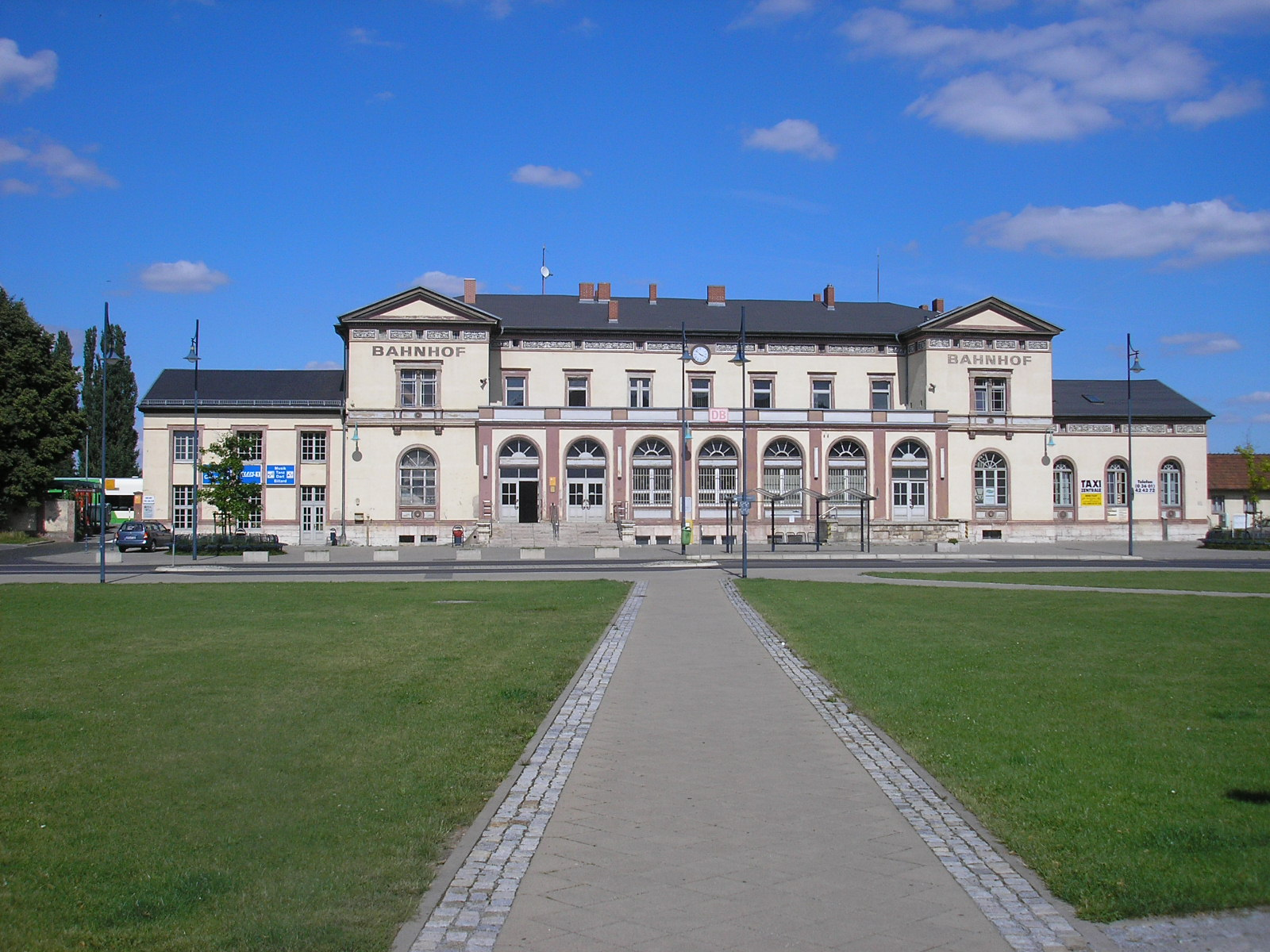 Bahnhofsgebäude vom Mühlhausen/Thüringen.